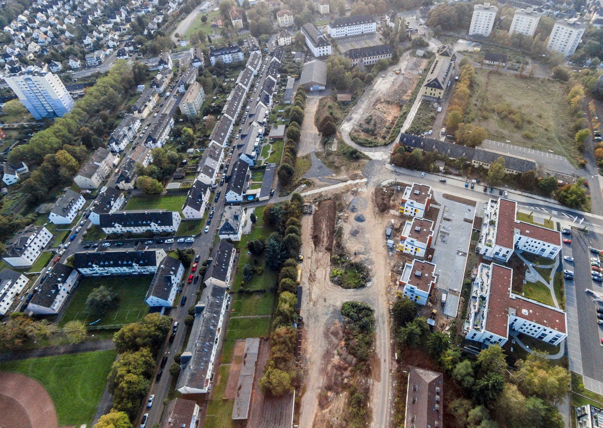 Luftbild von der Bergkaserne in Gießen.